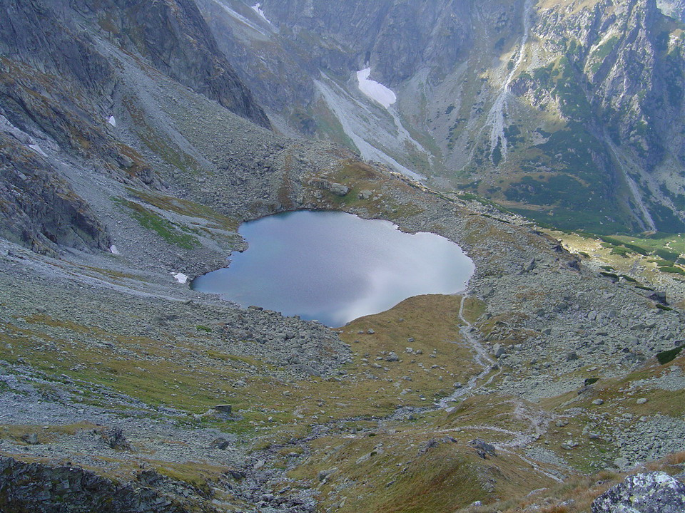 Litvorove pleso in Litvorova dolina